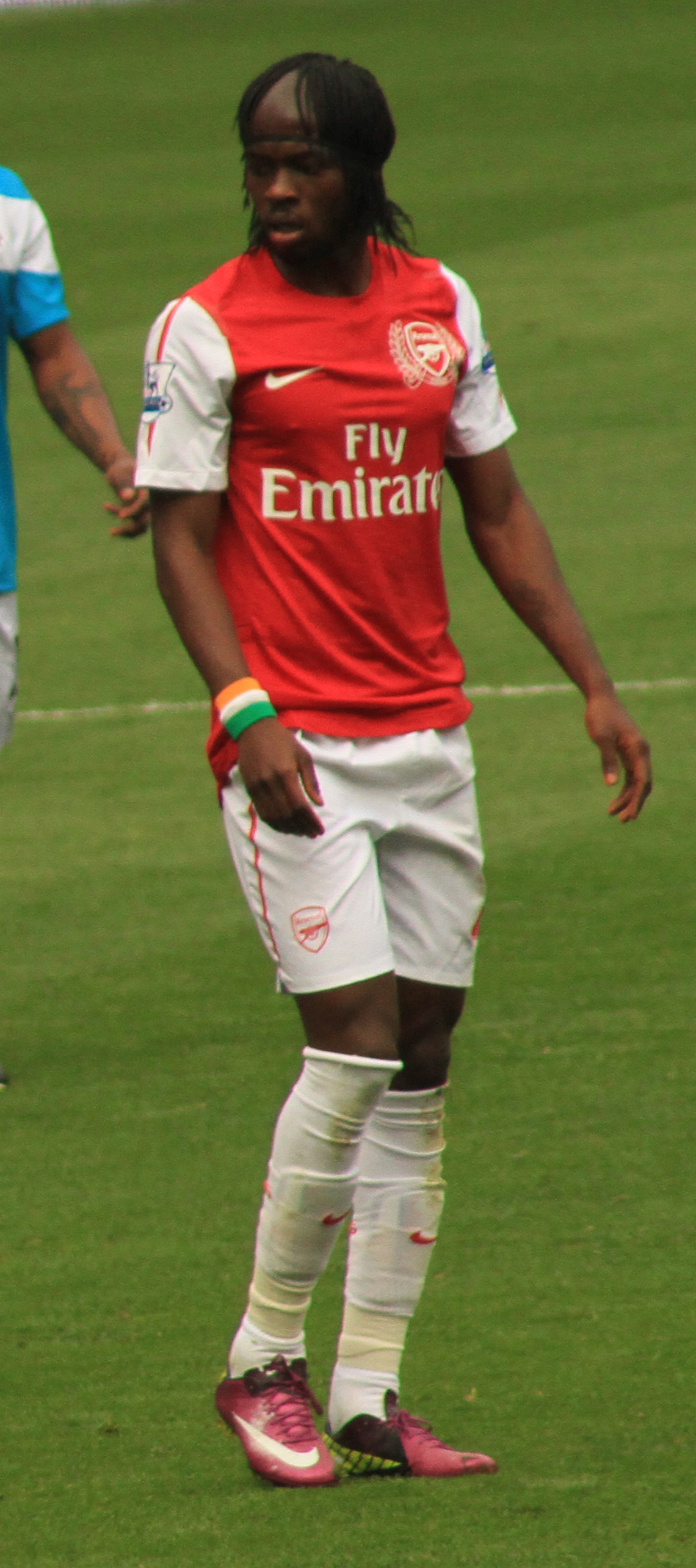 Жервиньо.